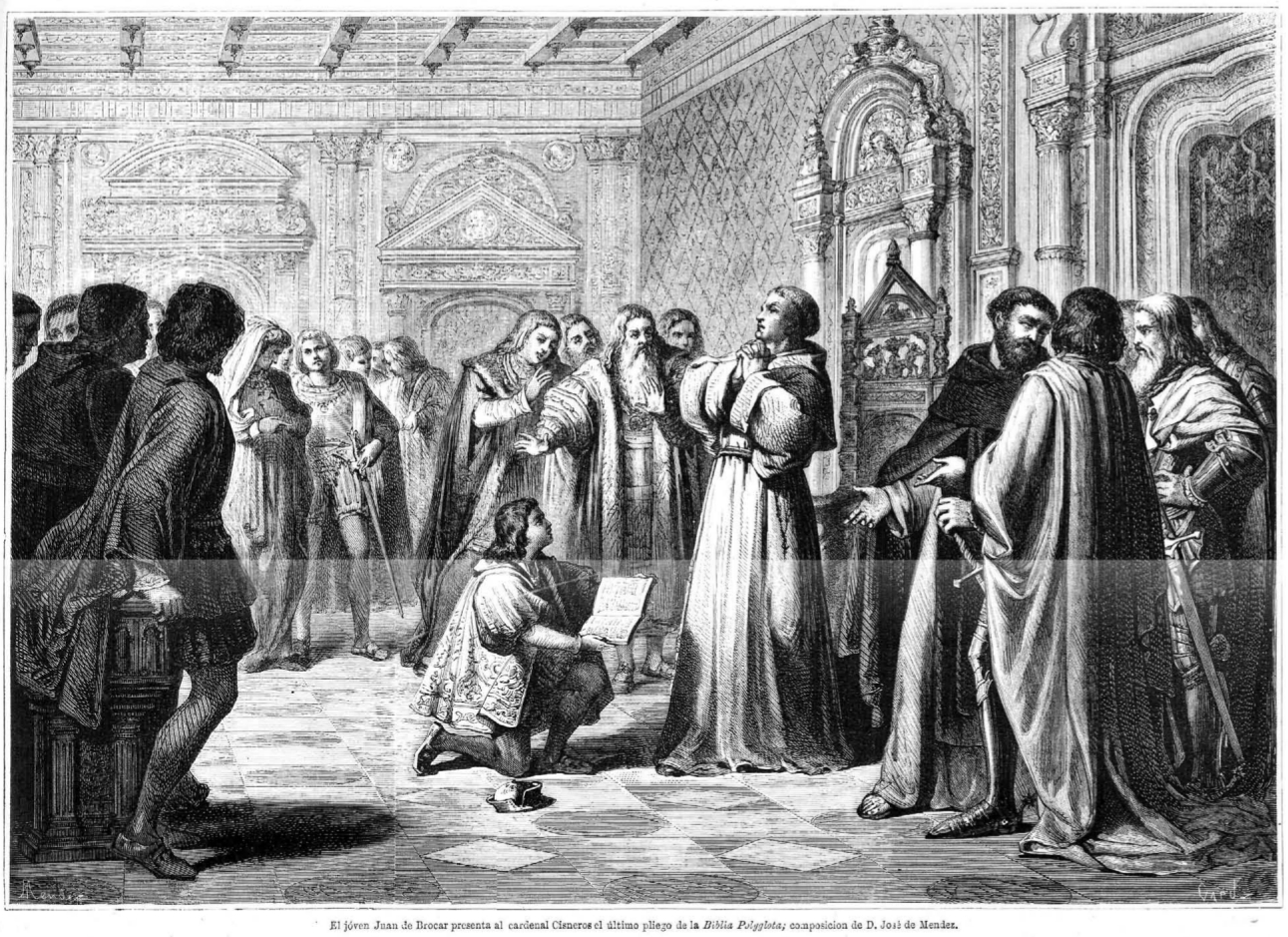 «El jóven Juan de Brocar presenta al cardenal Cisneros el último pliego de la Biblia Polyglota, composición de D. José de Méndez», en la revista La Ilustración Española y Americana.